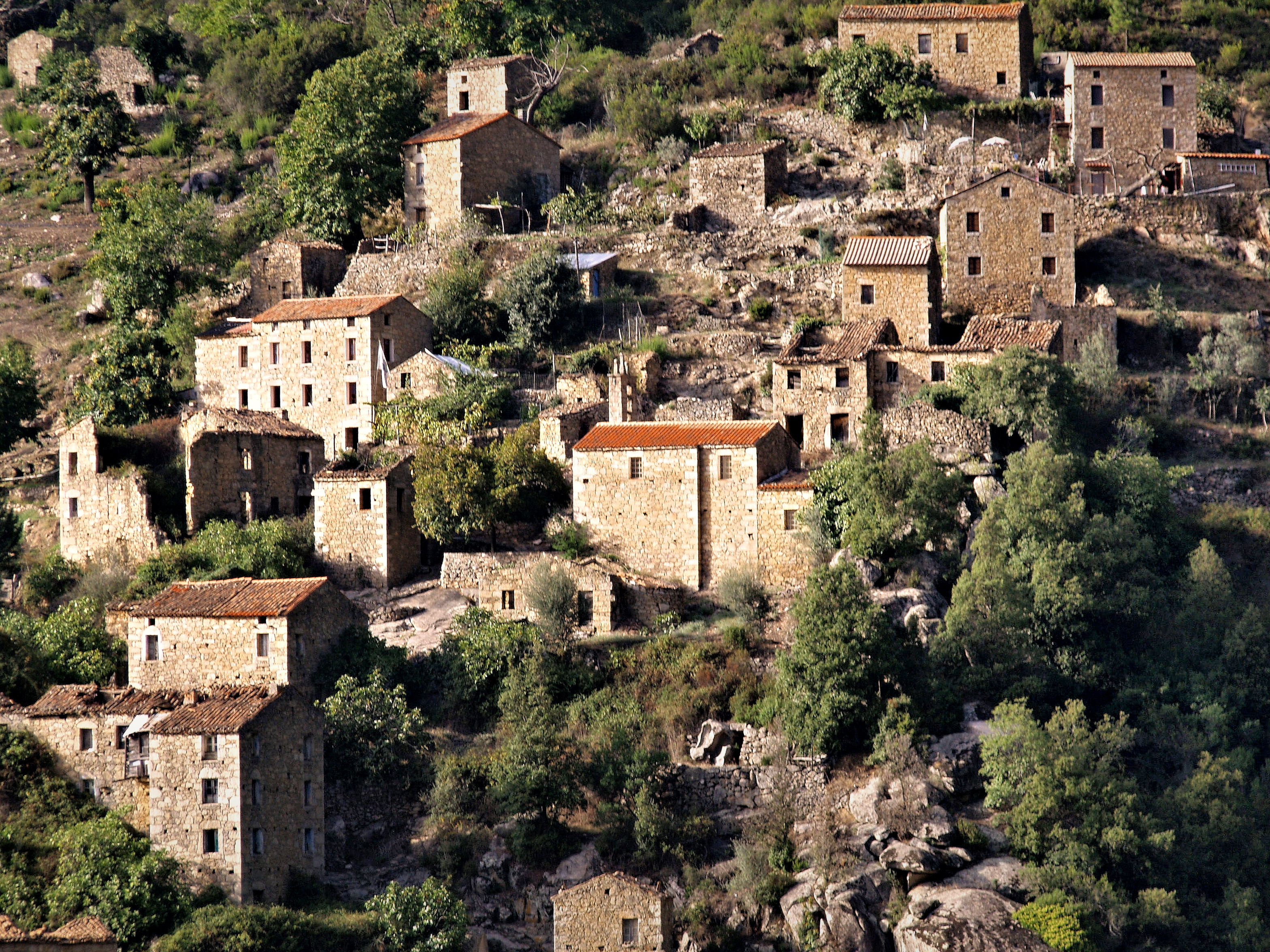 Murzo, Ouest Corse (Corse) - Village abandonné de Muna